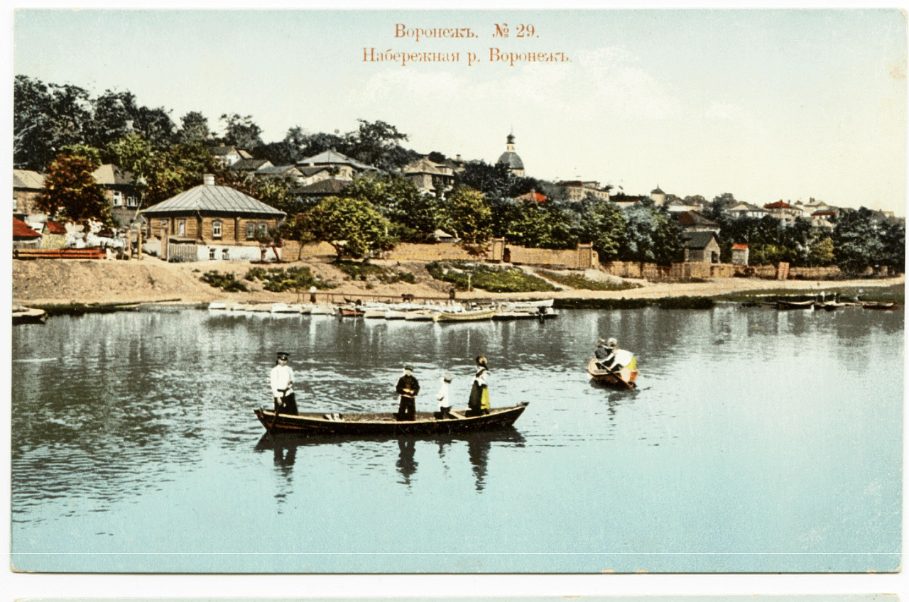 Набережная р. Воронеж (цветное)